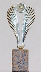 "Jurnalistlərin dostu" mükafatı